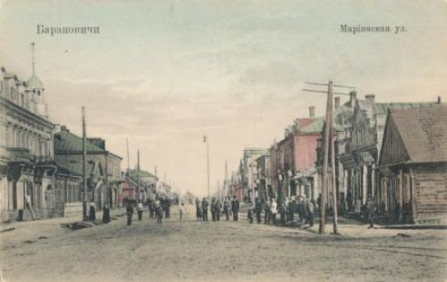 Музей: Баранавіцкі краязнаўчы музей Тып: выяўленчыя крыніцы Від: графіка прыкладная Прадметнае імя: паштоўка Назва/аўтарская назва: "Барановичи. Марiинская ул." Аўтары: Літвак М.; Калектыўныя аўтары: Выдавецтва кніжнай і папяровай крамы "Прогрессъ"; Матэрыялы: кардон; Тэхналогіі стварэння: друк каляровы; Дата стварэння: пачатак ХХ ст. Месца стварэння: Расійская Імперыя, Баранавічы Памеры: 8,7х13,7 см